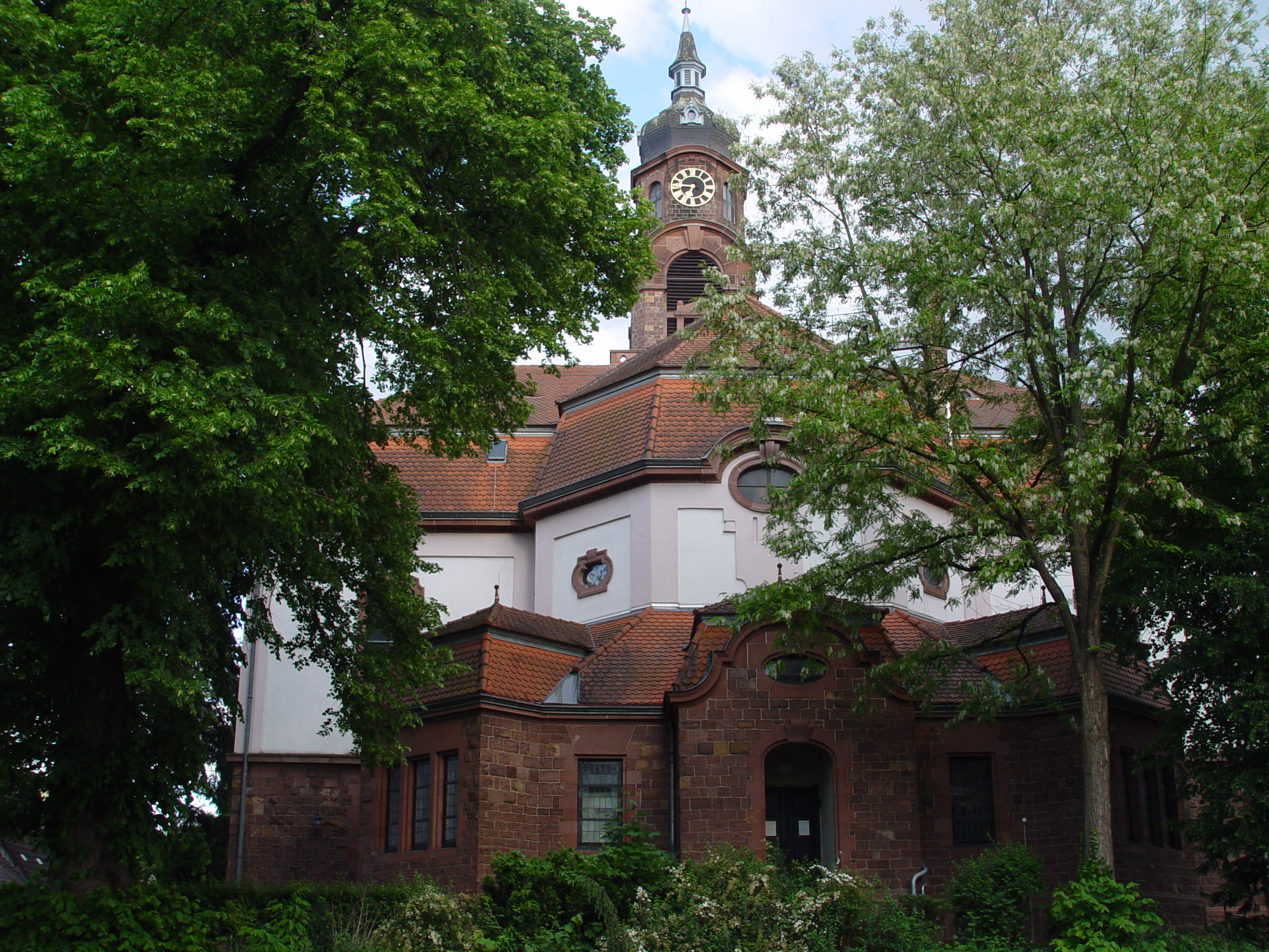 Evangelische Auferstehungskirche Karlsruhe-Rüppur